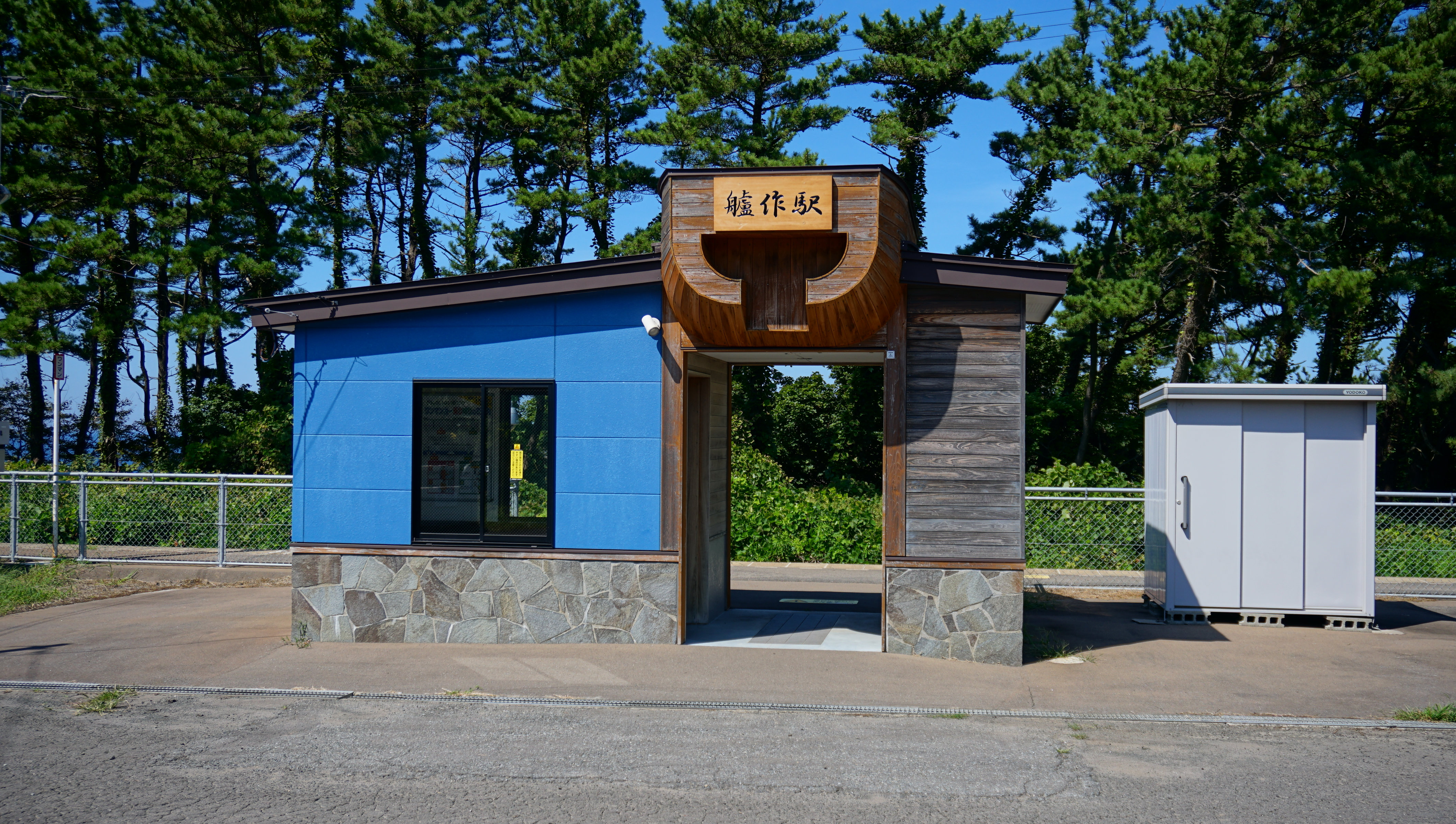 五能線 艫作駅（青森県西津軽郡深浦町）